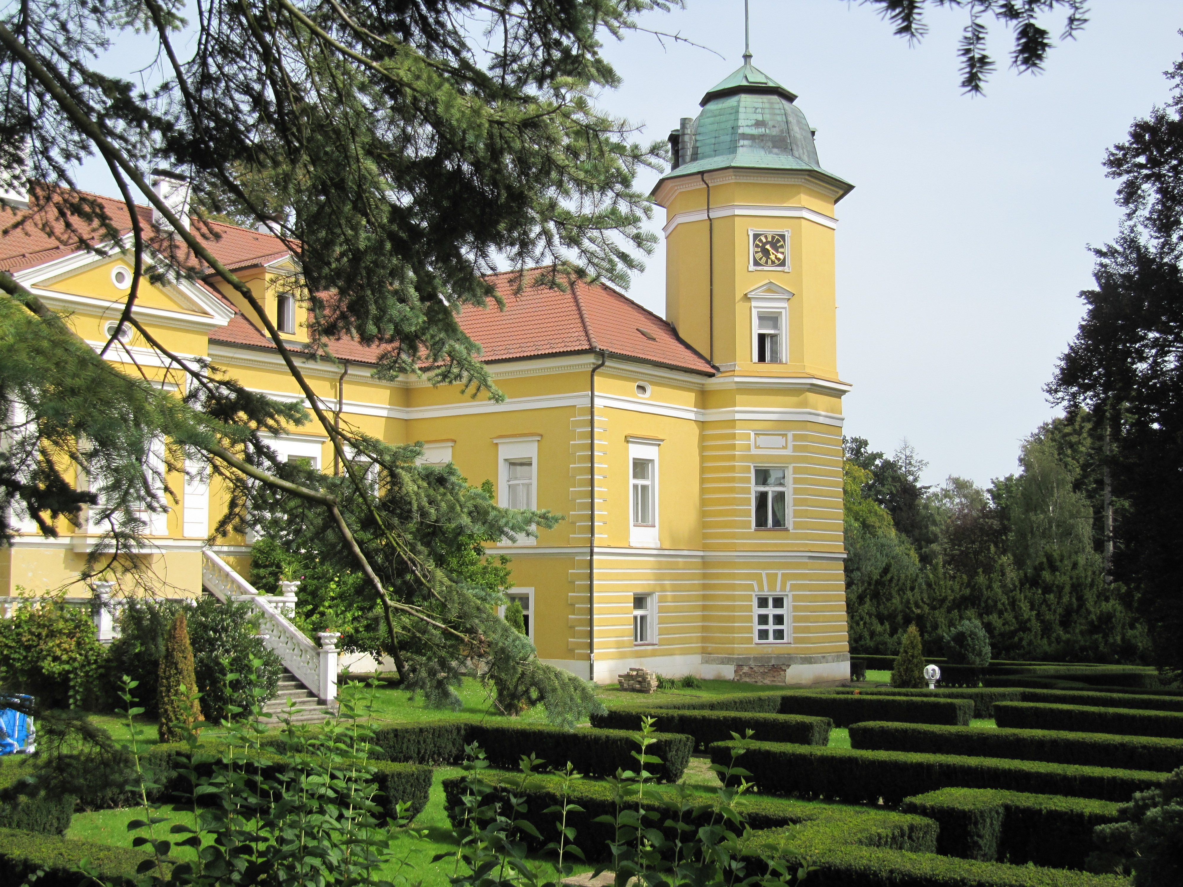 Zámek Chotoviny, Na Nádvoří 1, Chotoviny